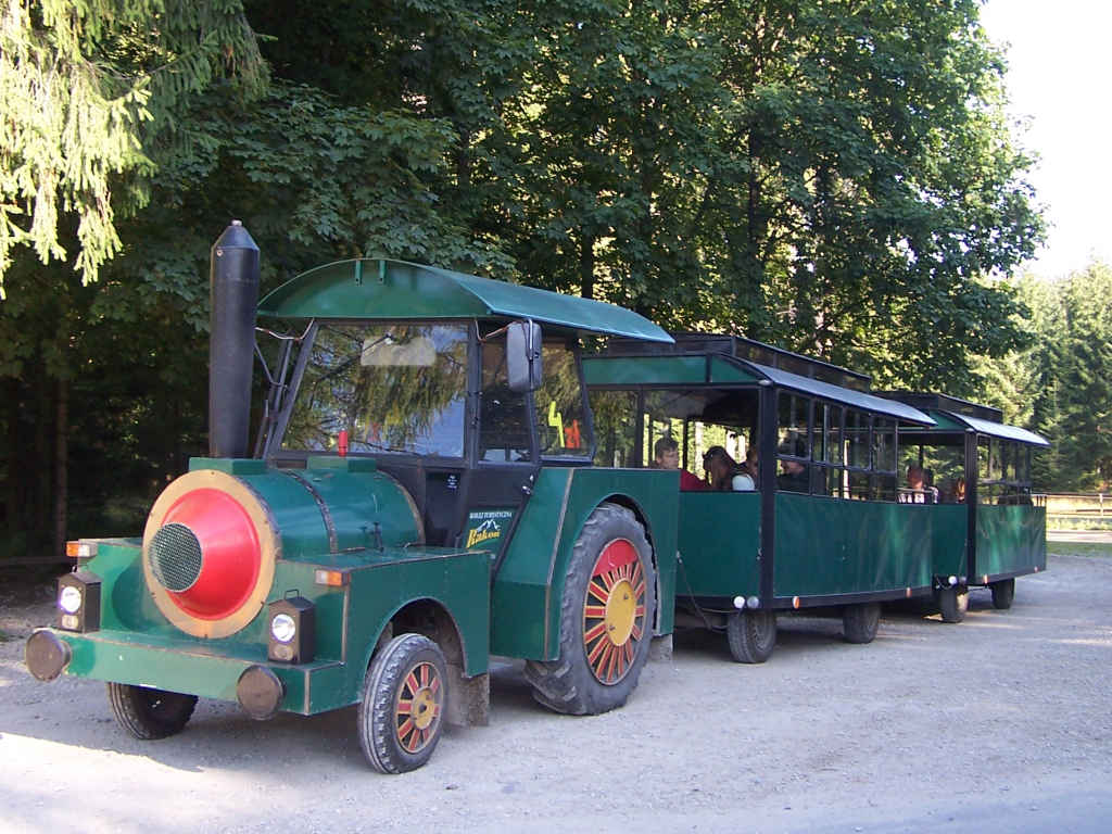 Siwa Polana (Tatra Mountains)